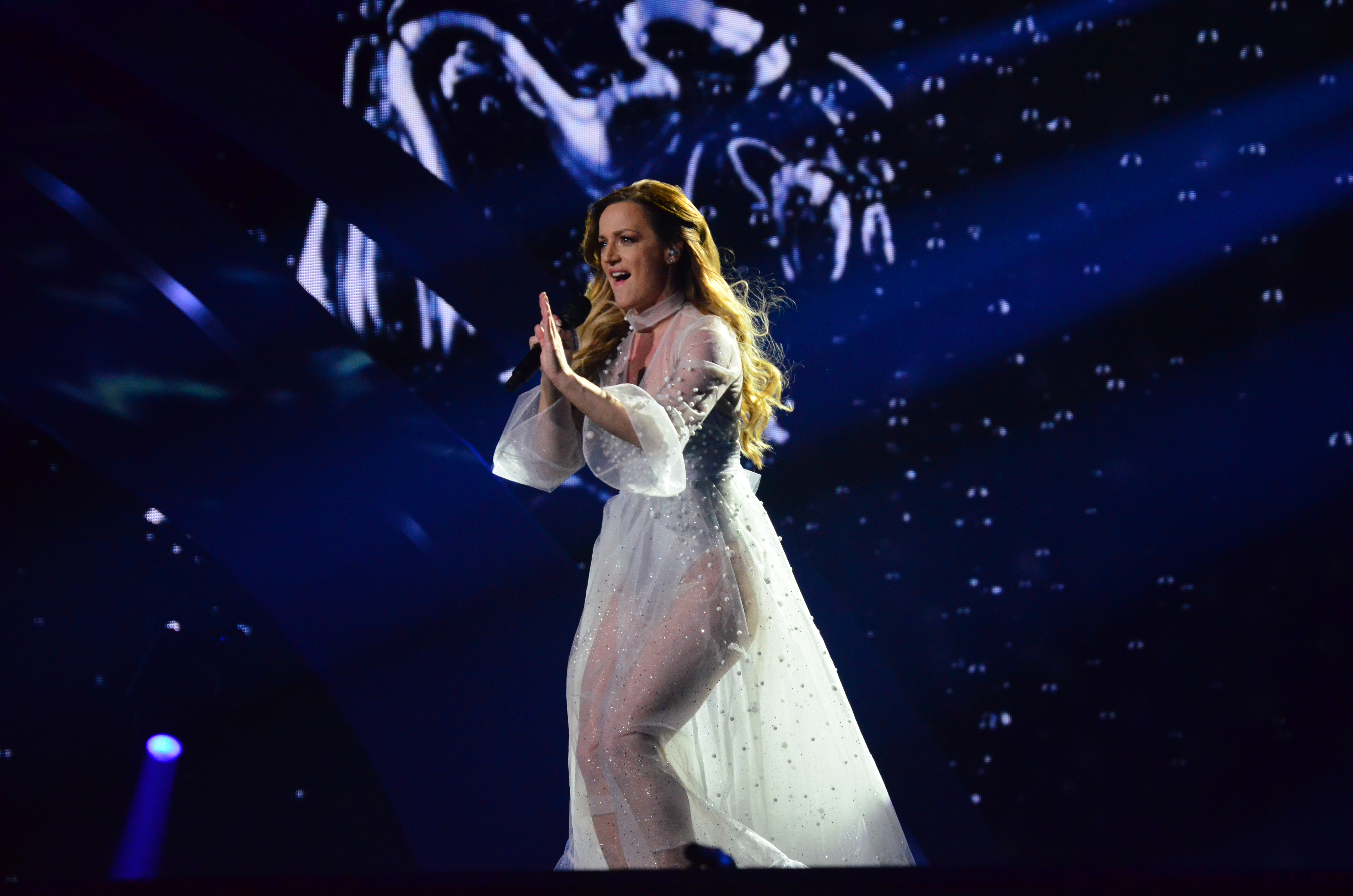 10 травня 2017 року у Києві відбулась генеральна репетиція 2 півфіналу "Євробачення".